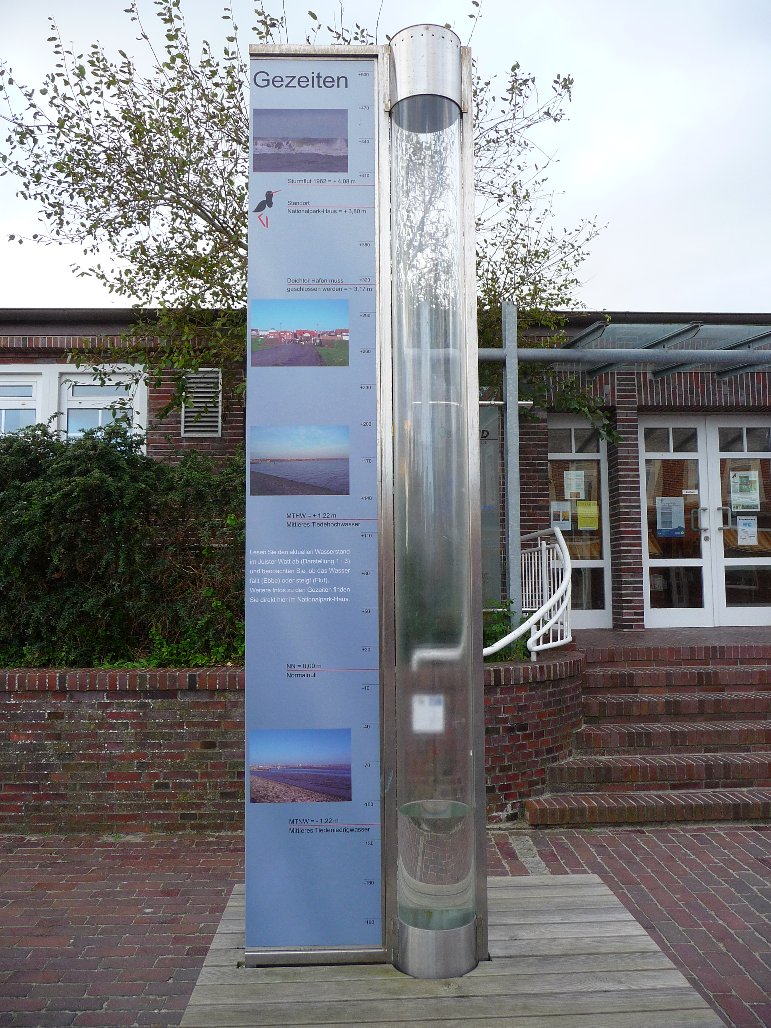 Gezeitensäule vor dem Nationalparkhaus auf der ostfriesischen Nordseeinsel Juist (Niedersachsen, Deutschland) [Funktion=]